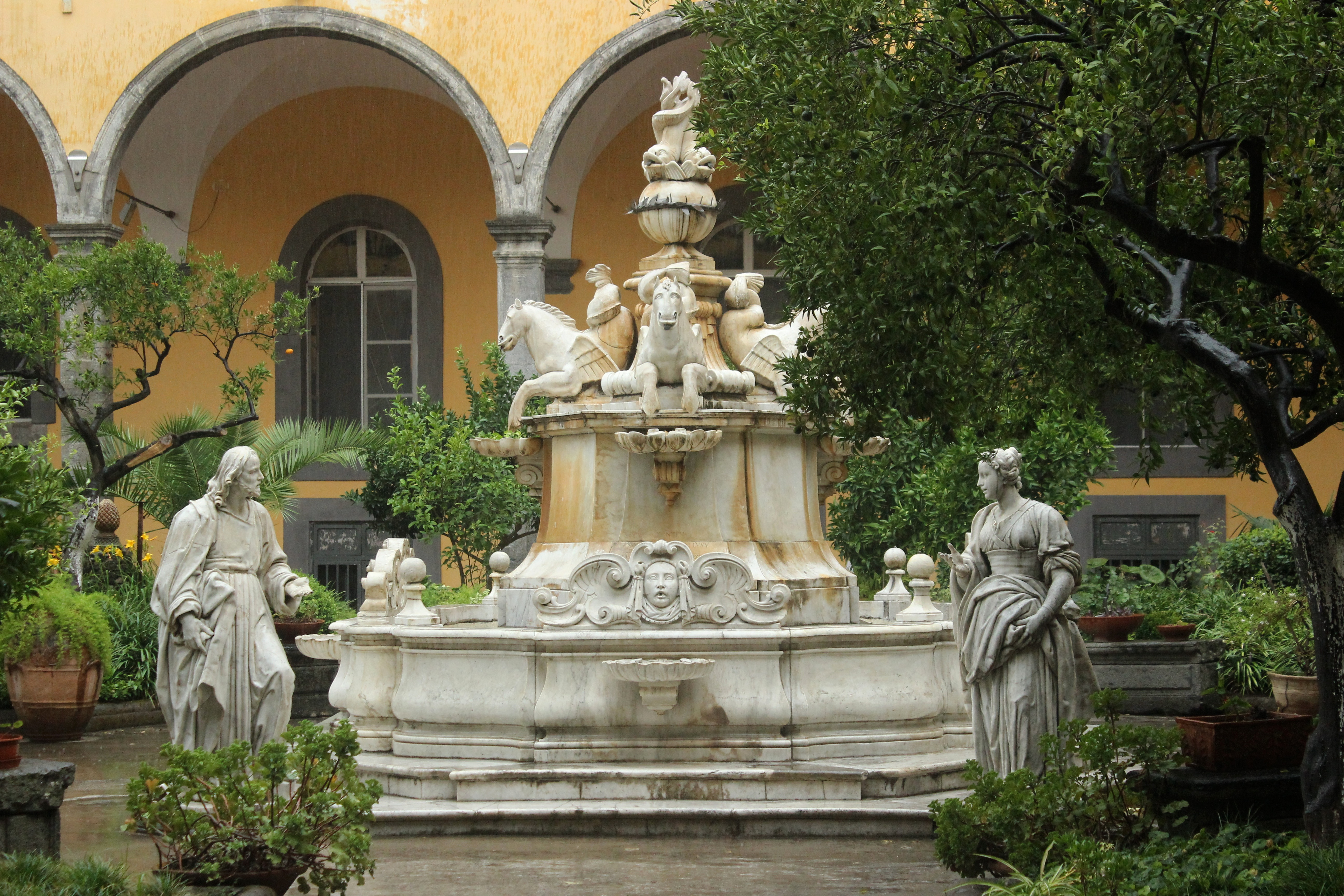 Nápoles. San Gregorio Armeno. Fuente de la samaritana en el claustro. Matteo Bottigliero.